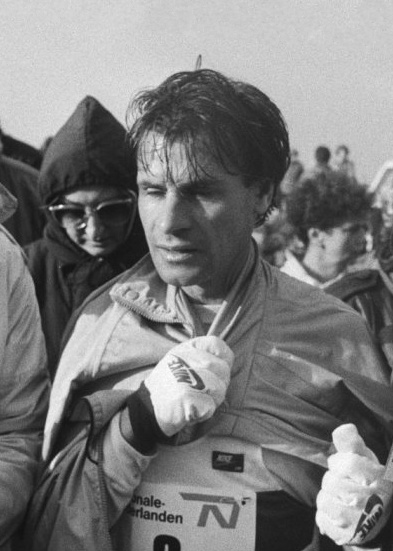 14e halve marathon in Egmond aan Zee. Carlos Lopes